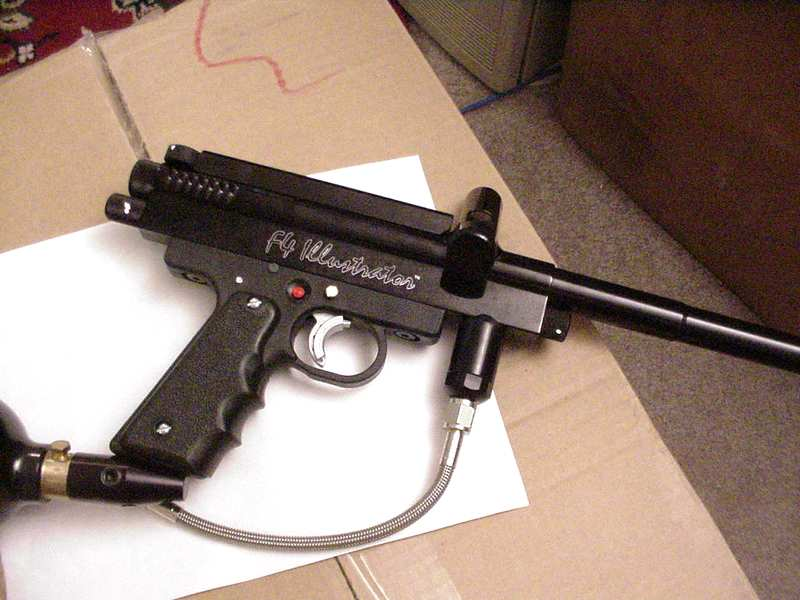 photo de paintball